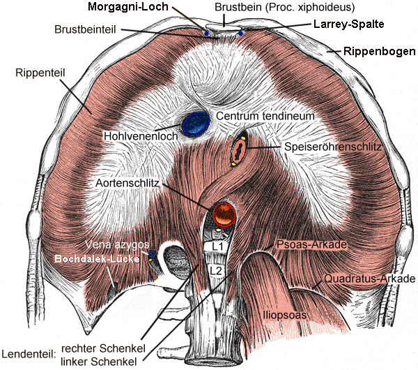 Zwerchfell